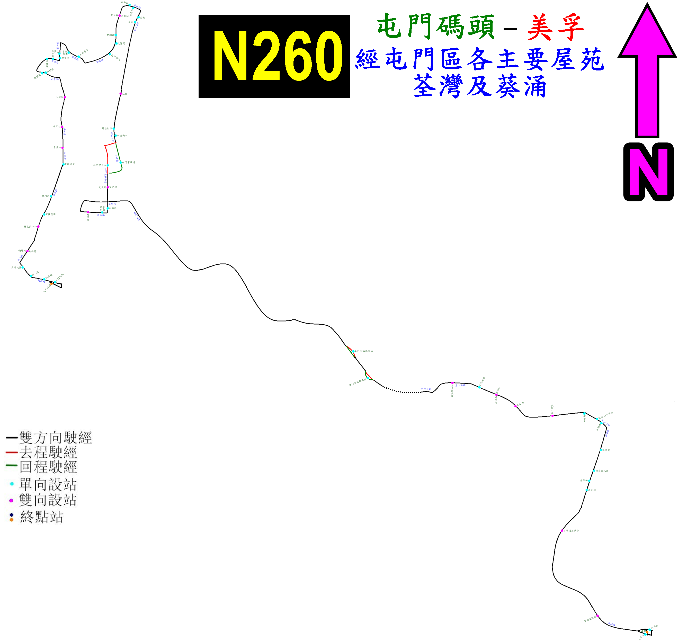 中文（香港）: 九巴深宵巴士N260線的走線圖